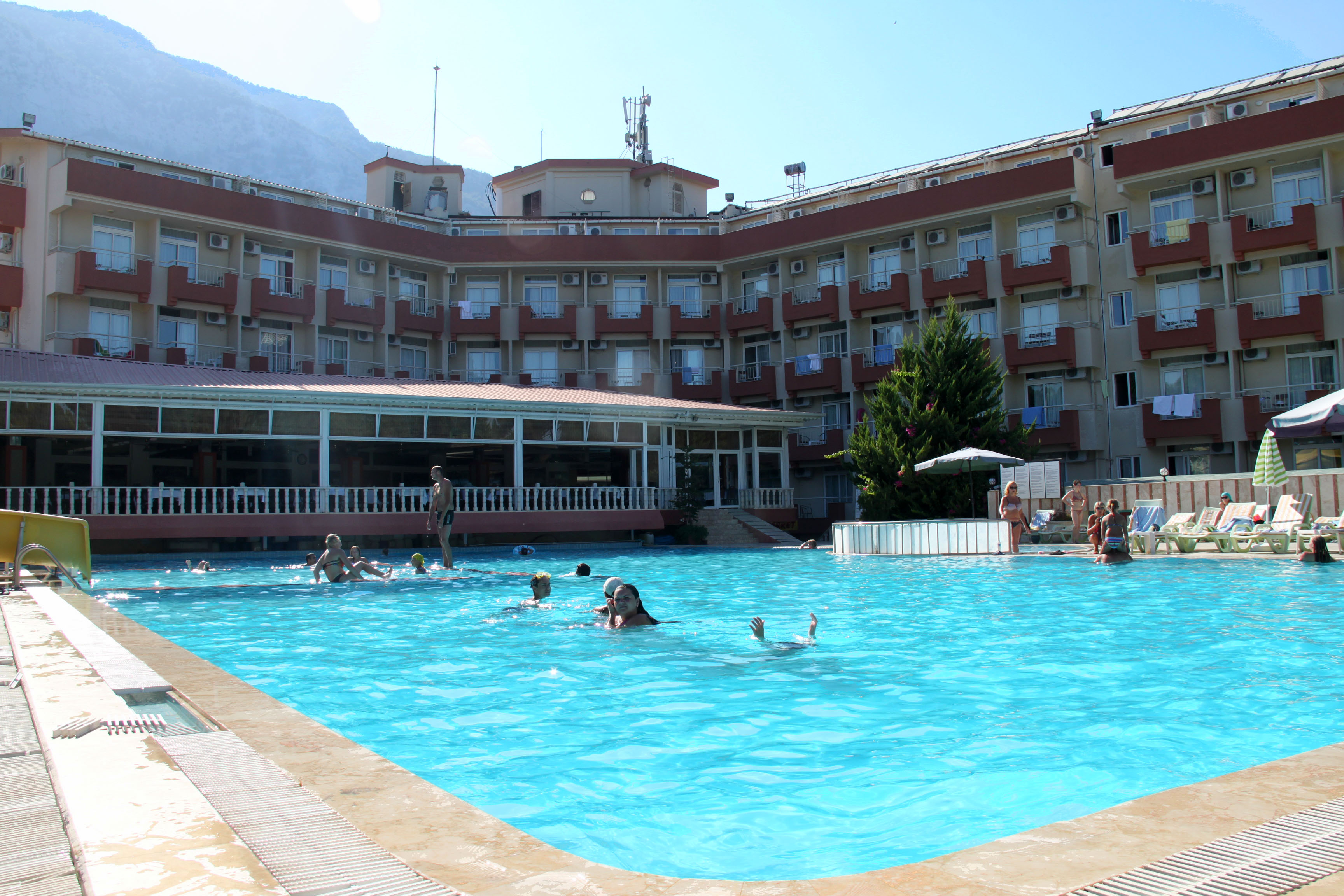 Бассейн гостиницы в Бельдиби, Турция